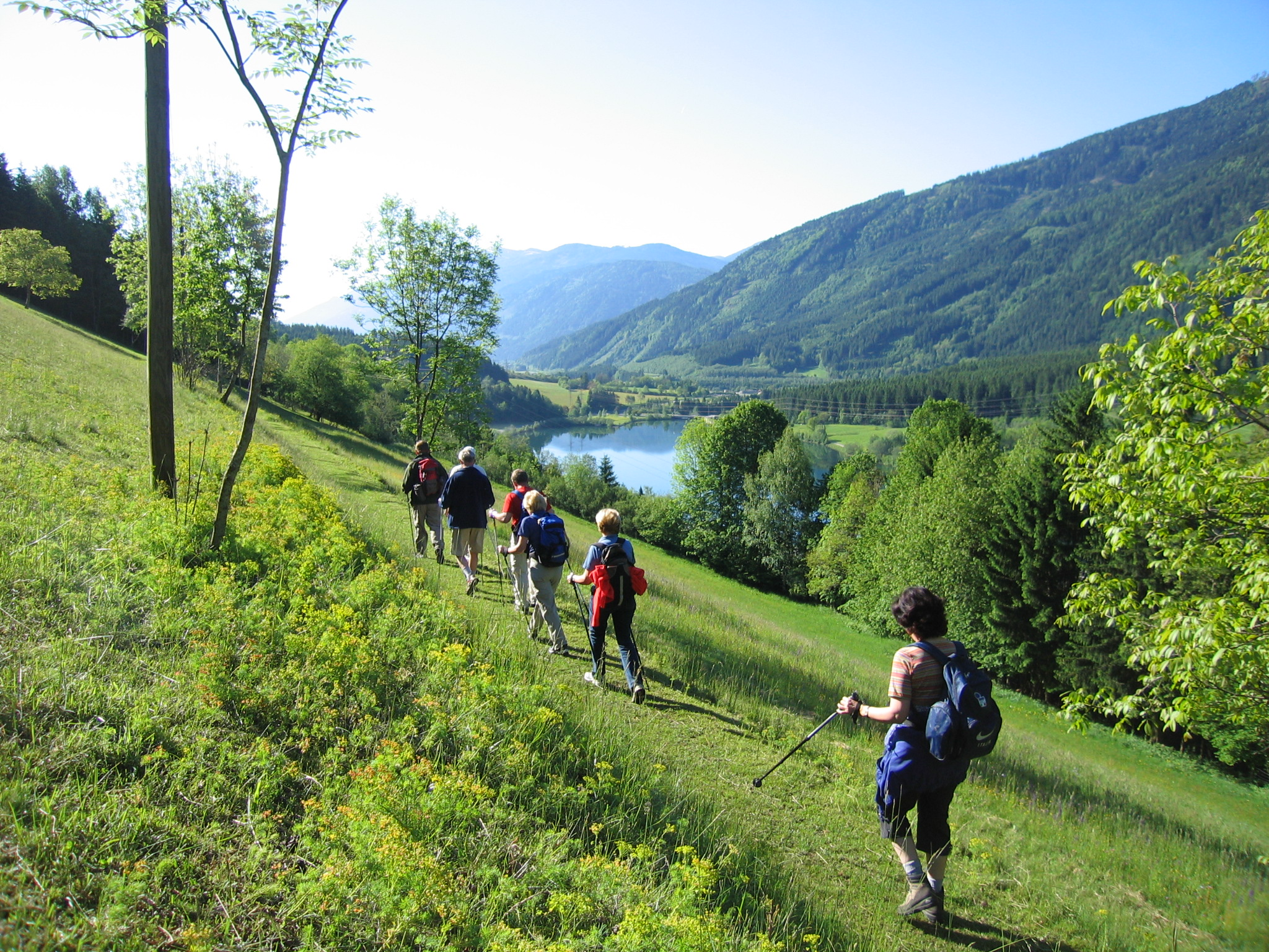 Wandern in Reißeck Marka